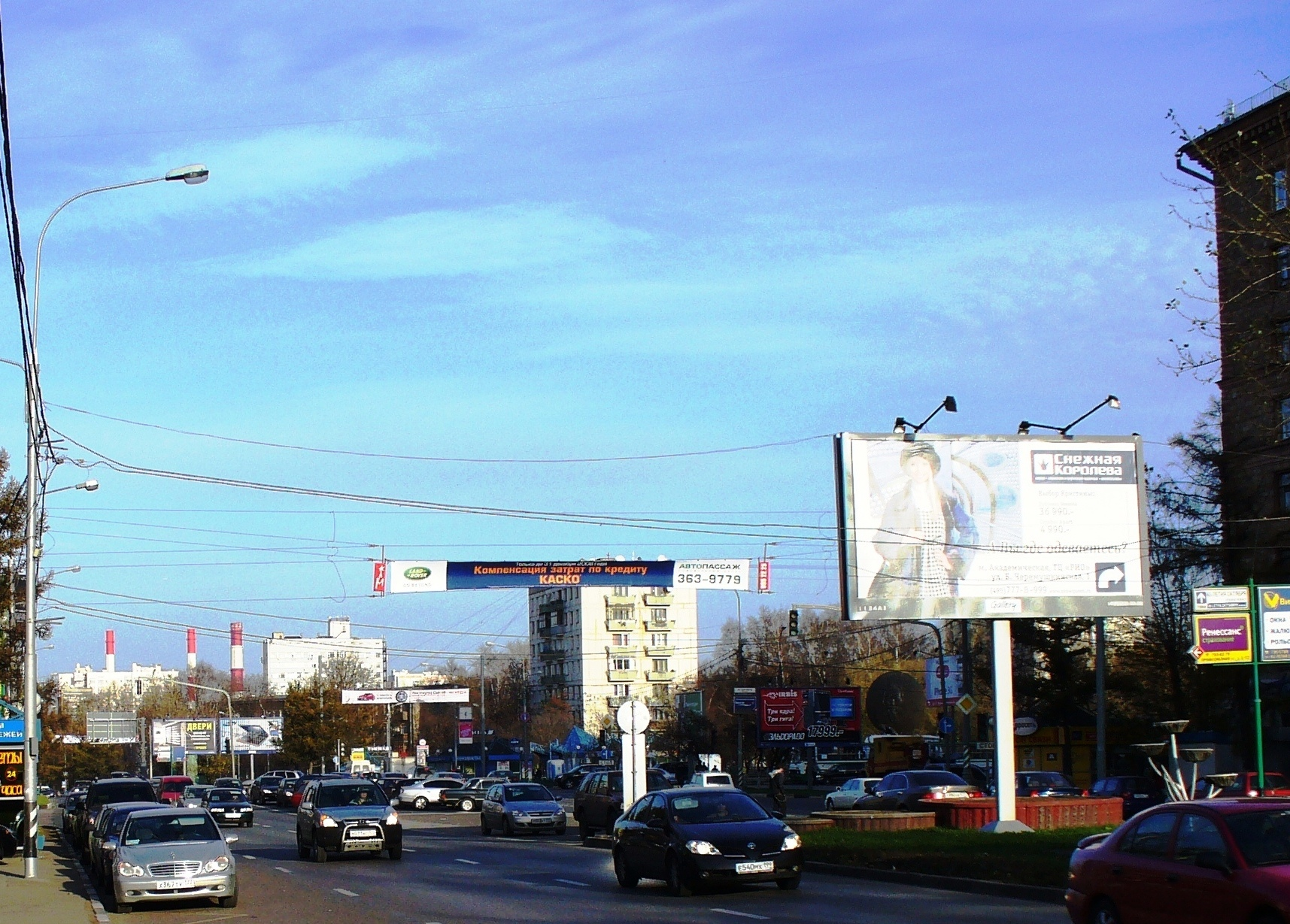 Площадь Хо Ши Мина в Москве. Вид от Профсоюзной улицы в центр